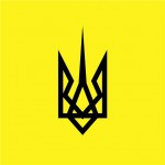 The so-called «Runic Trident» - one of the official emblems of the «Patriot of Ukraine». Note the sharpened base of the symbol compared to the rounded used by the so-called «State Trident». «Рунічний Тризуб» є емблемою «Патріота України» й зображується чорним кольором на золотому тлі. Порівняння Державного (ліворуч) і Рунічного (праворуч) Тризубів.